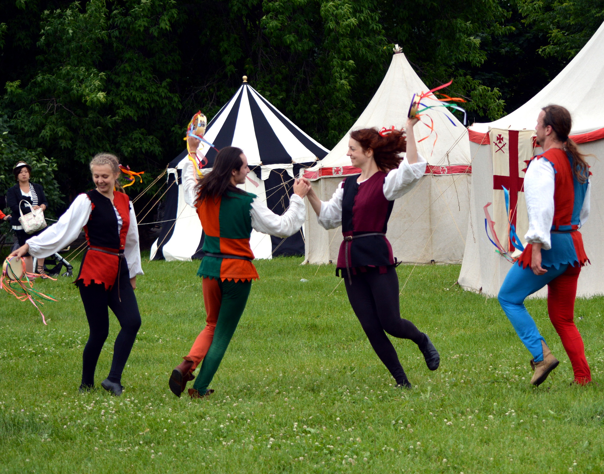 Фестиваль исторической реконструкции "Времена и эпохи" в Коломенском.